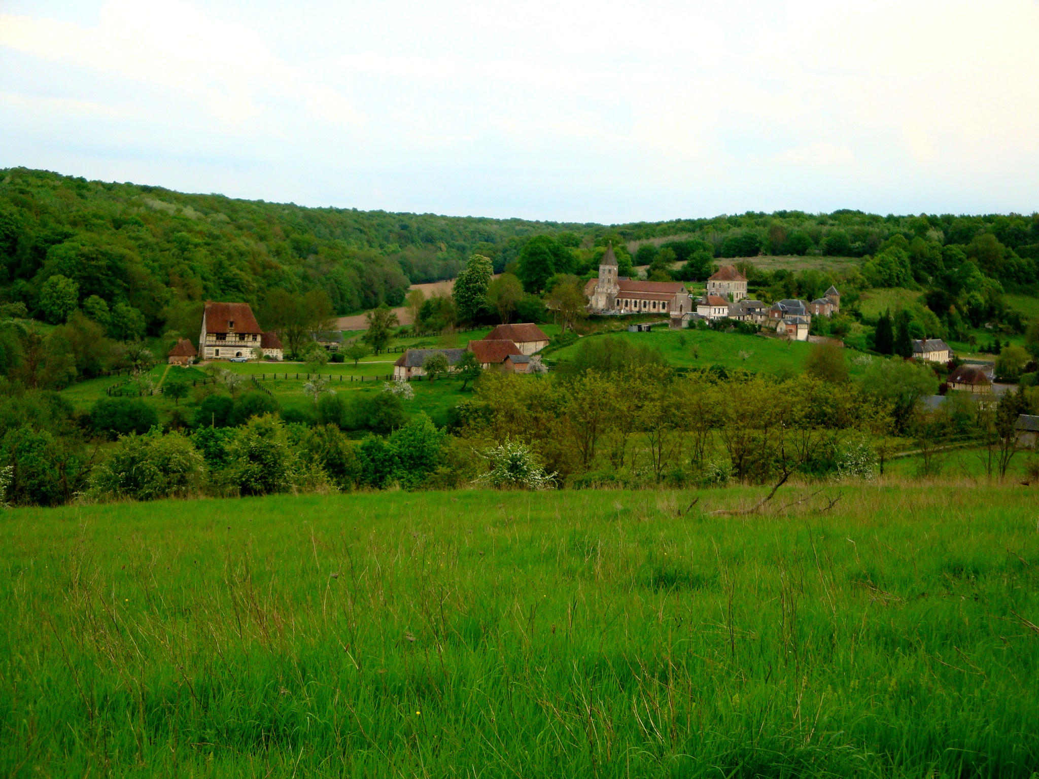 Vue de Tordouet